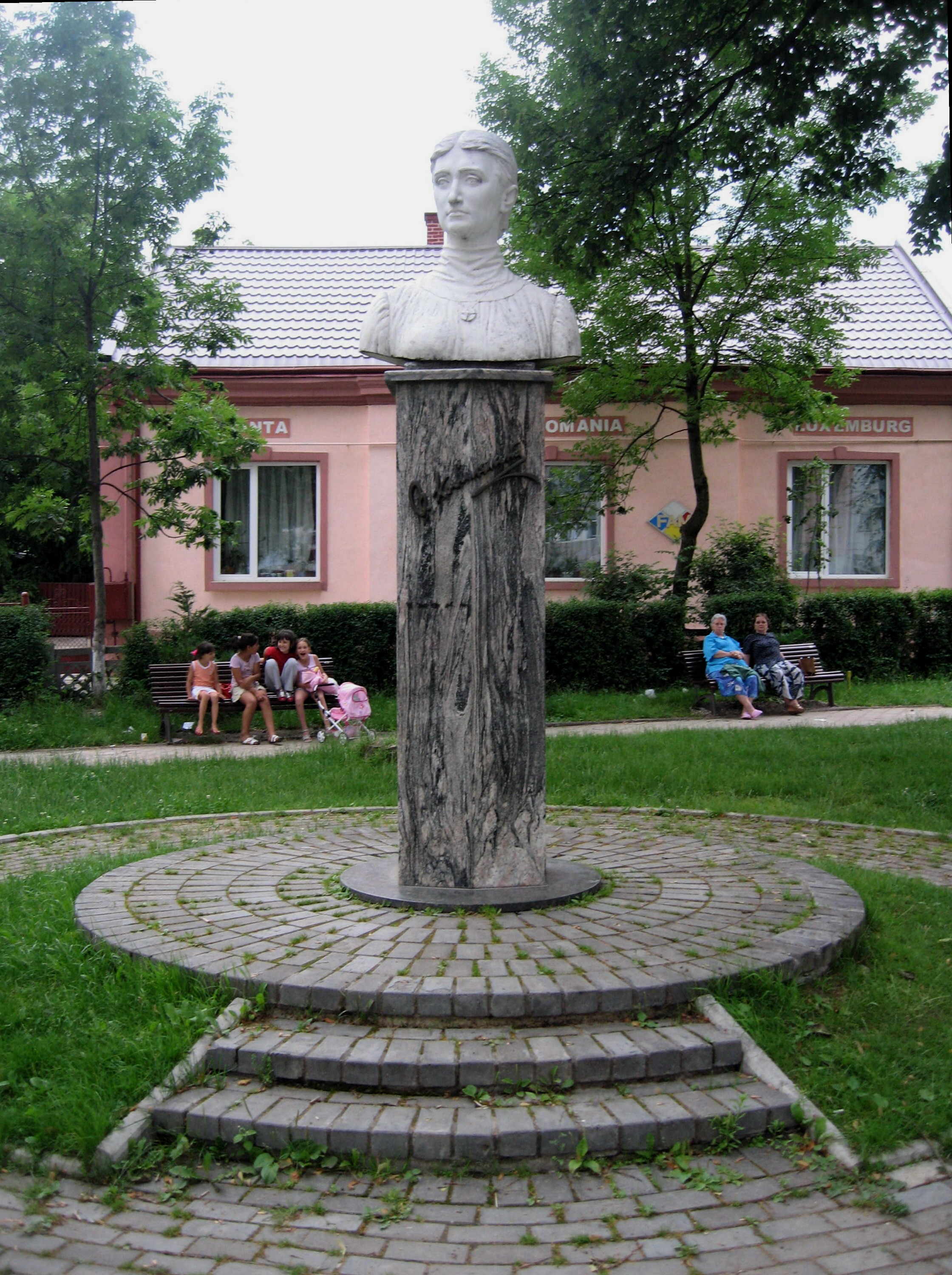 Bustul Olgai Kobyleanska din Gura Humorului